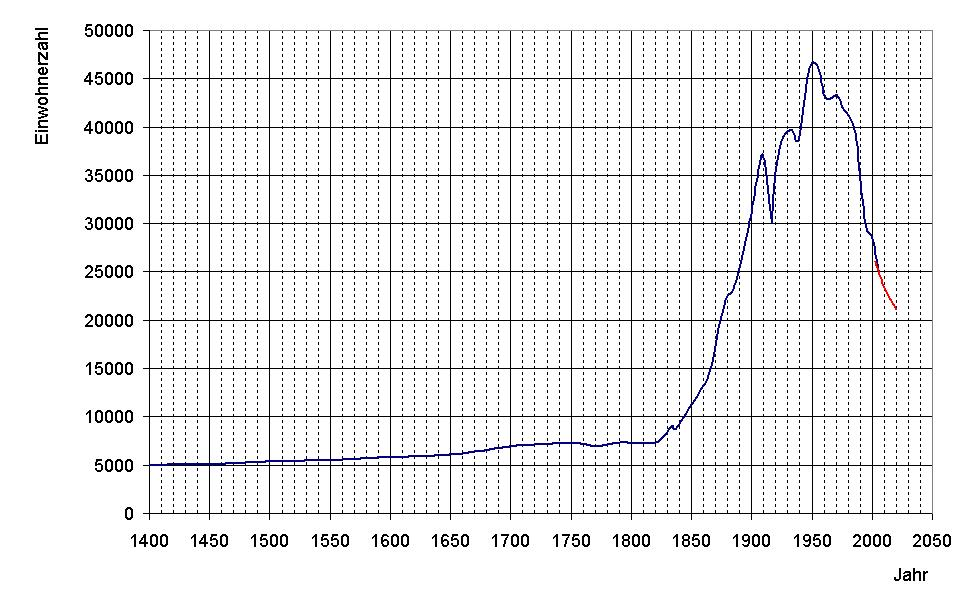 Entwicklung der Einwohnerzahl von Zittau von 1400 bis 2020